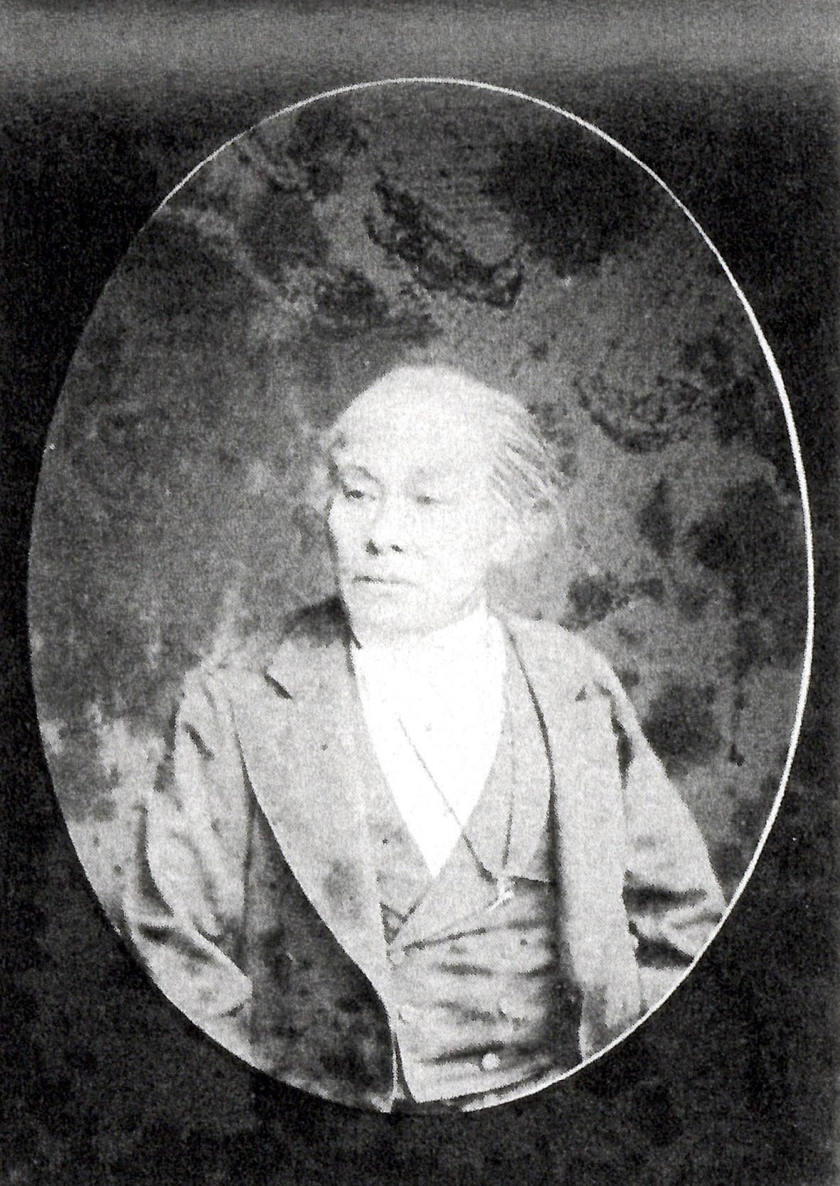 市橋長和の肖像写真。